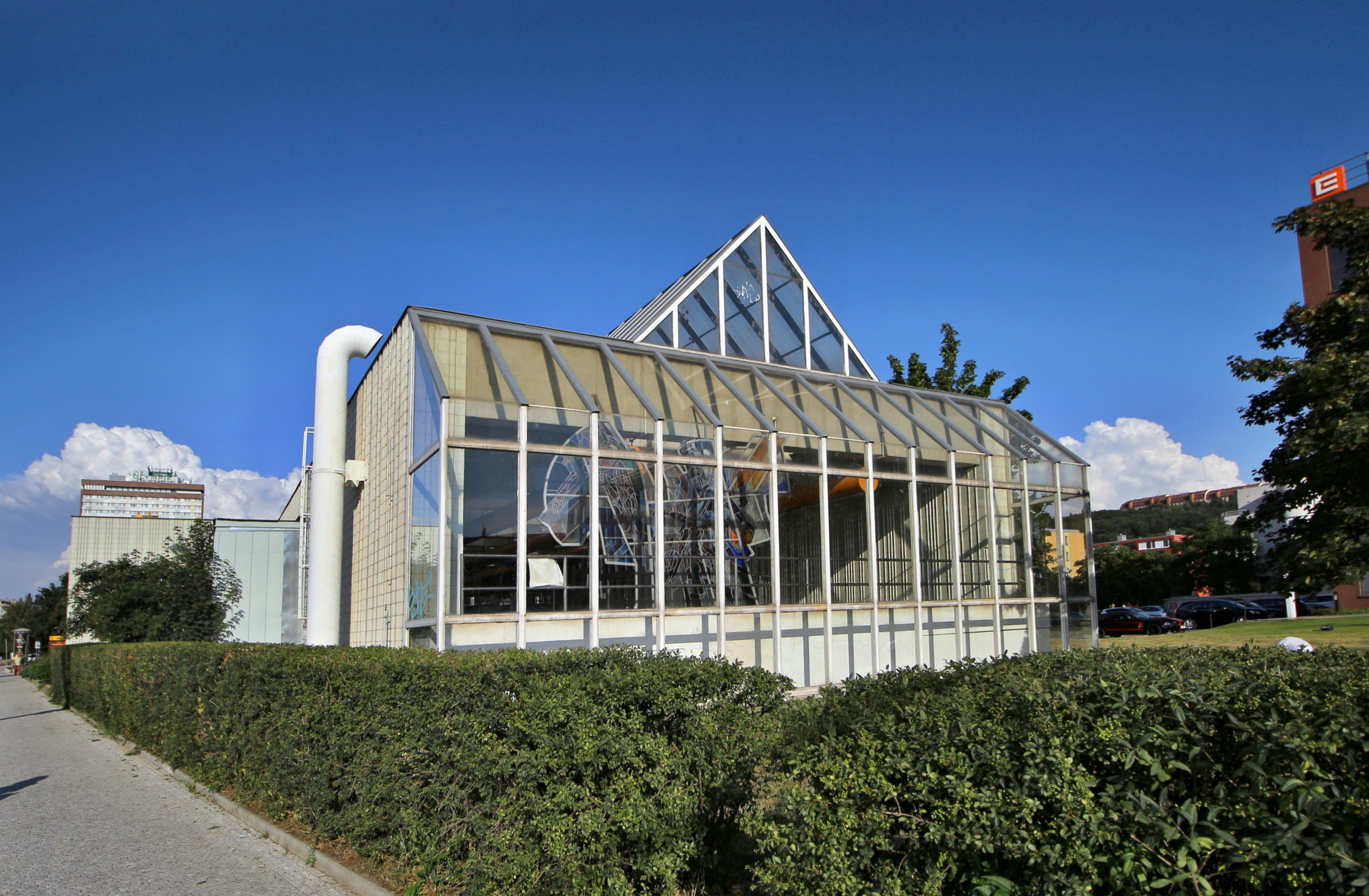 Stanice pražského metra, trasa B, Invalidovna